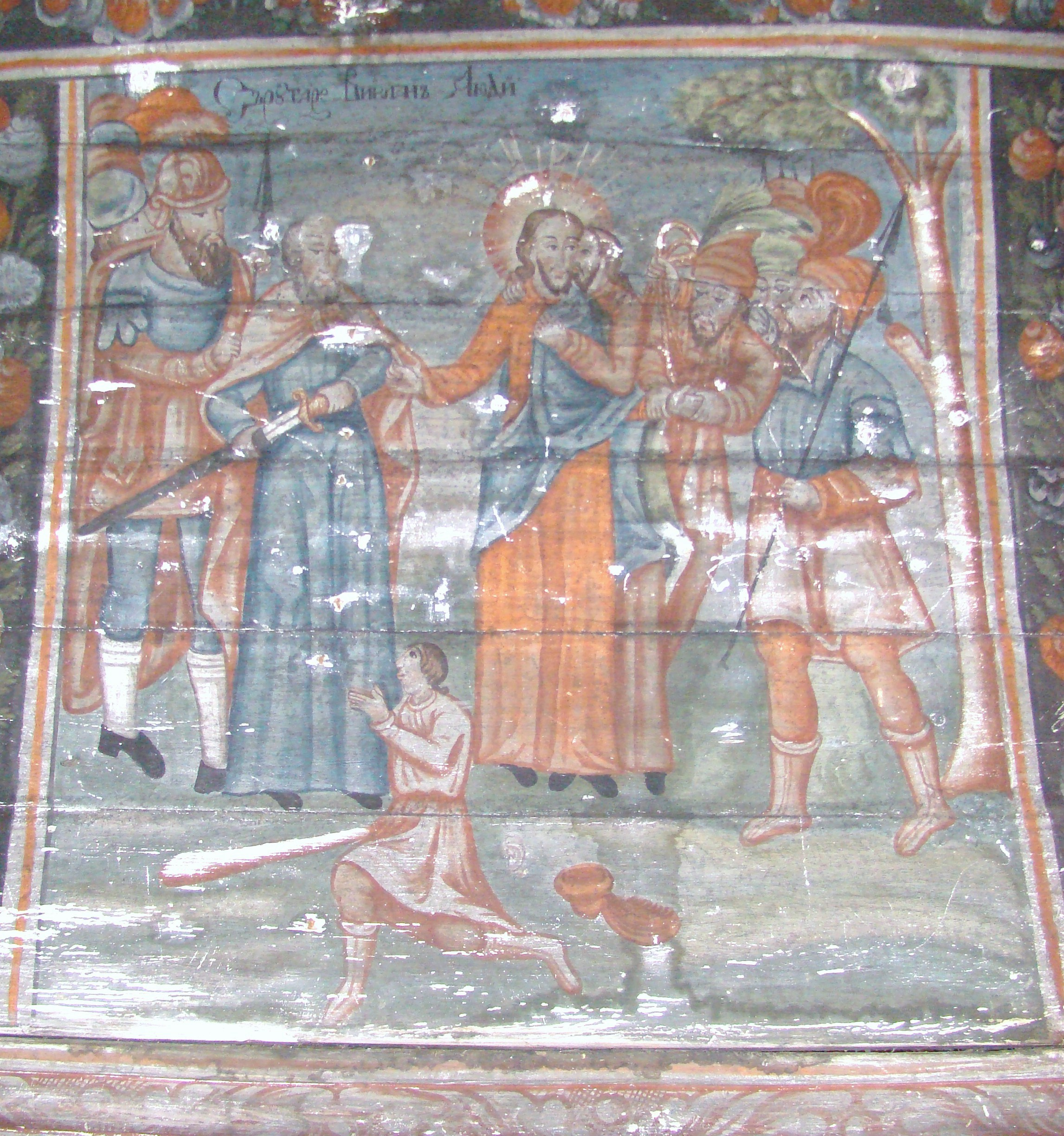 Biserica de lemn din Osoi